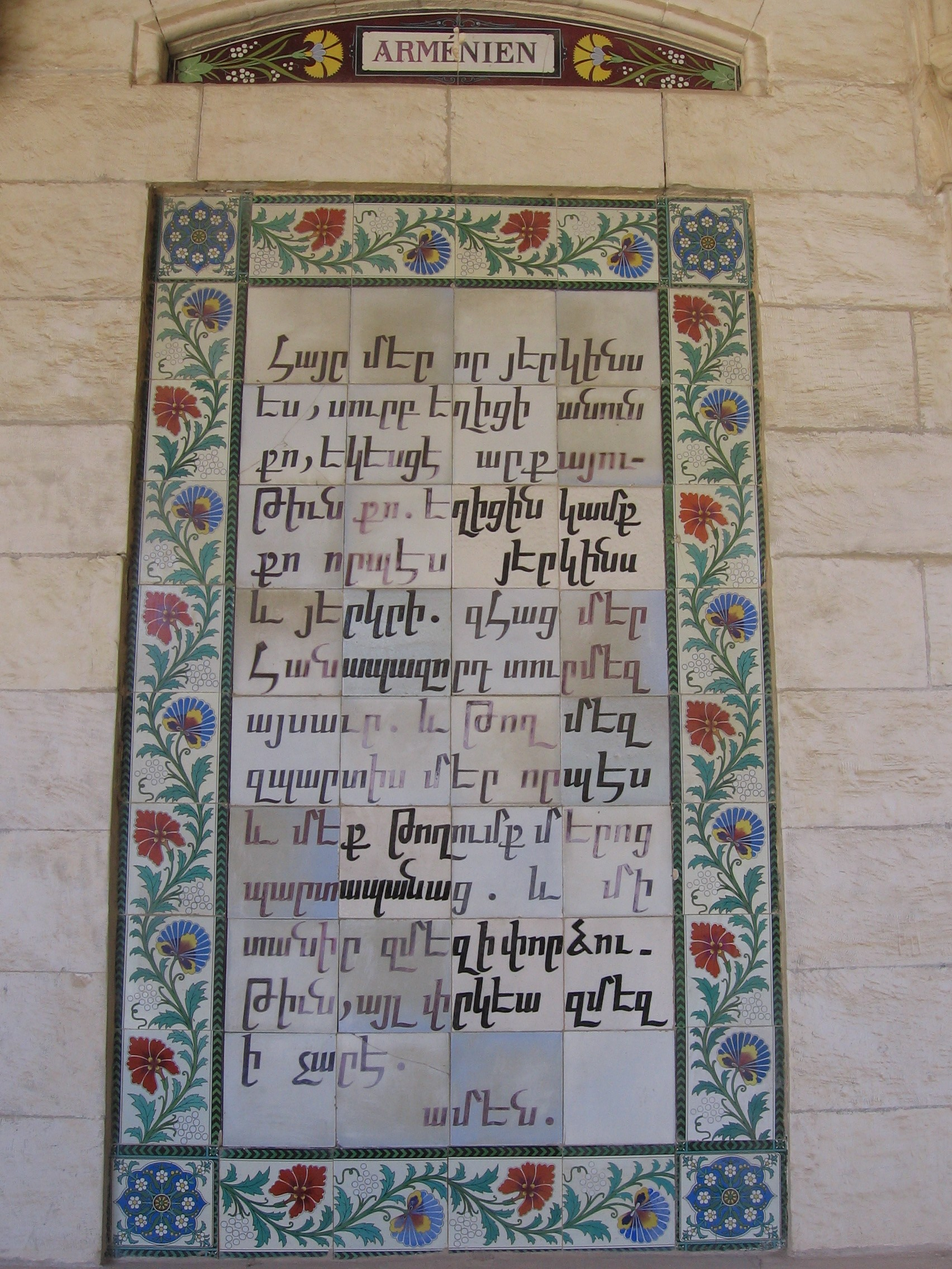 Chiesa del Padre Nostro, a Gerusalemme. Preghiera in armeno